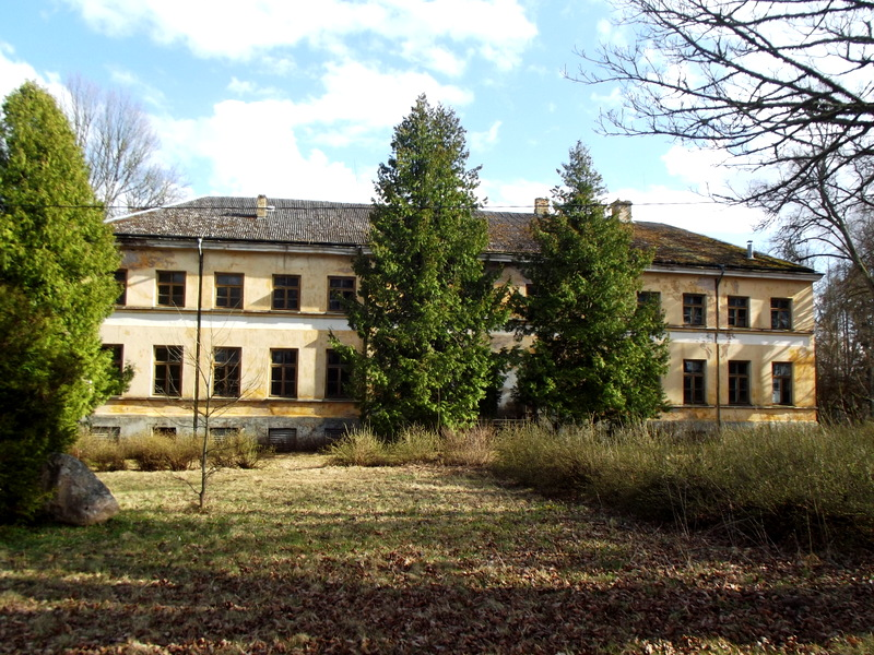 Struteles muiža